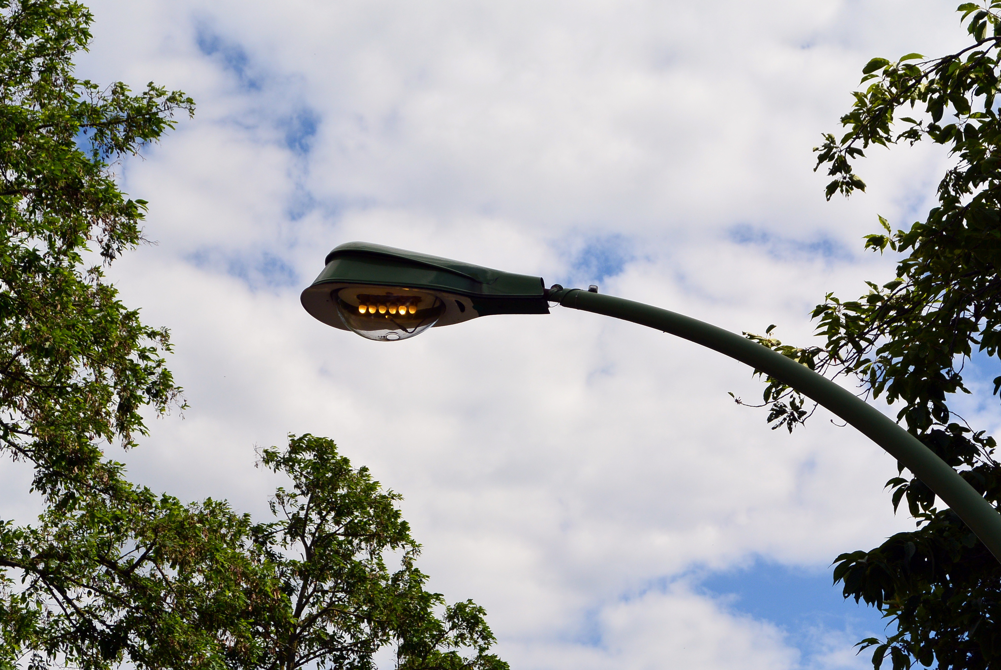 Gaslaterne bei Tageslicht in Frankfurt